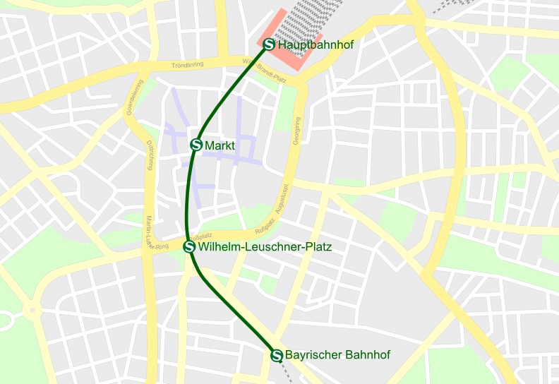 Verlauf des Leipziger Citytunnels